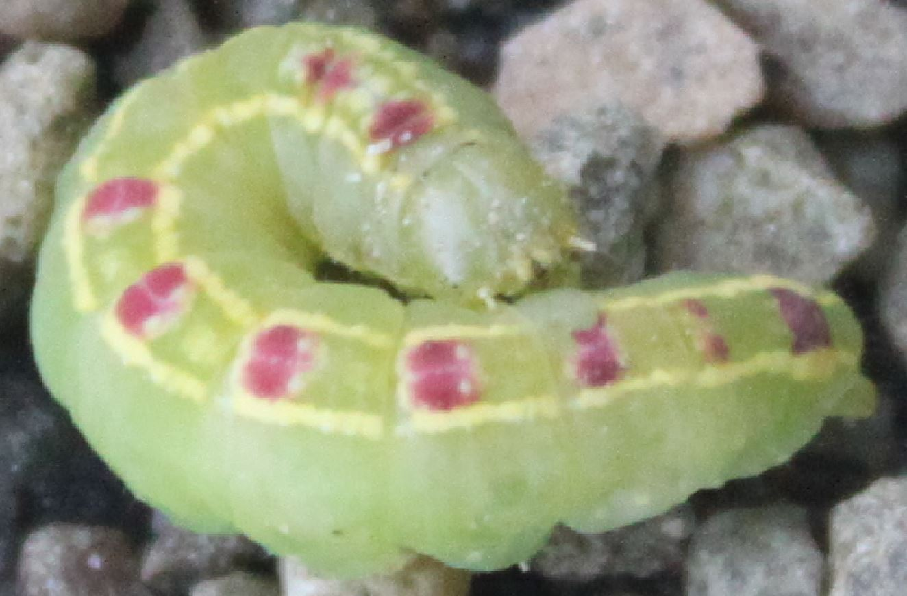 Raupe des Pappelauen-Zahnspinners (Gluphisia crenata)